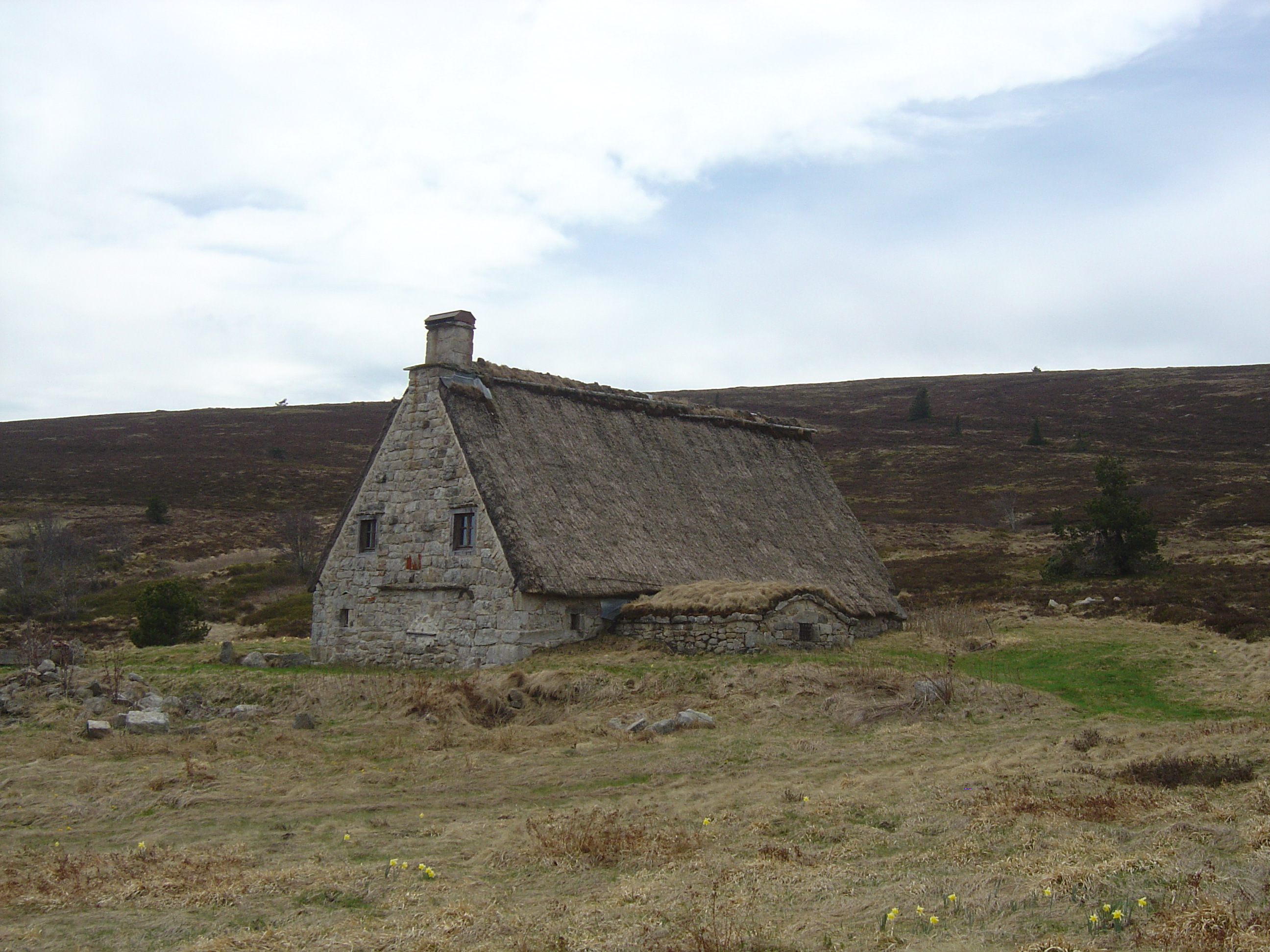 Jasseries de la Croix du Fossat. Ici la seule chaumière des trois jasseries.